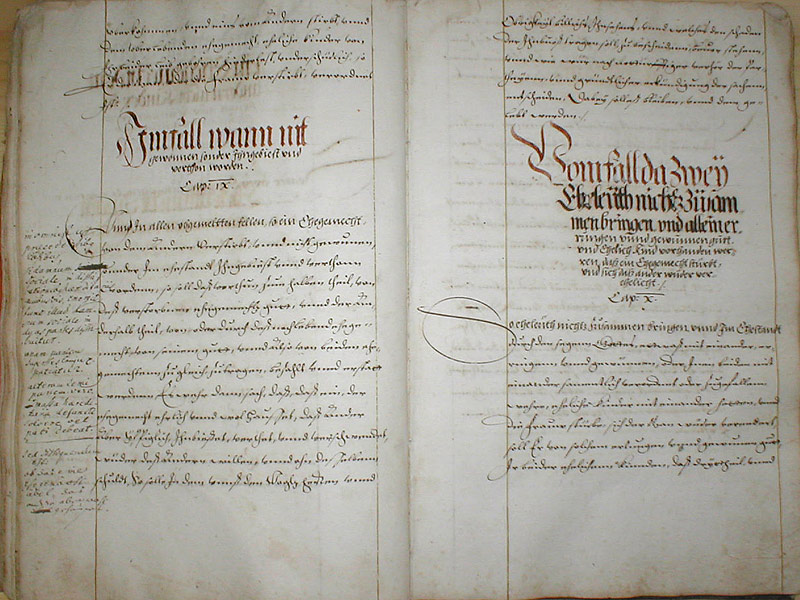 Doppelseite der Stadt- und Gerichtsordnung von Kochendorf (heute Ortsteil von Bad Friedrichshall) aus dem 16. Jahrhundert, hier dargestellt sind Erbrechtsfragen.